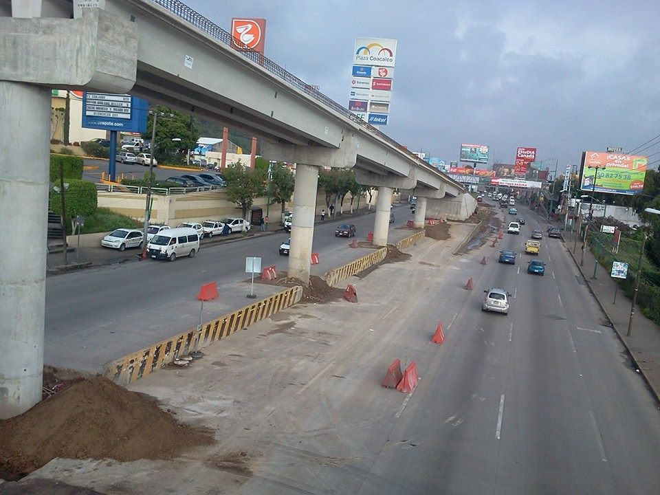 hace referencia a la inversión en proyectos que beneficien a la sociedad. tasa social de descuento